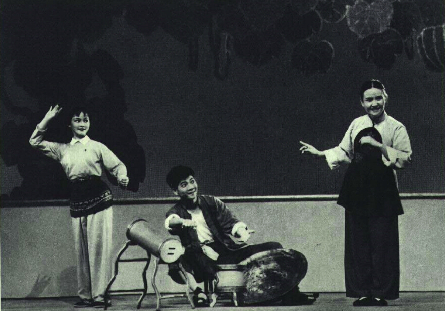 1966-01 花鼓戏补锅